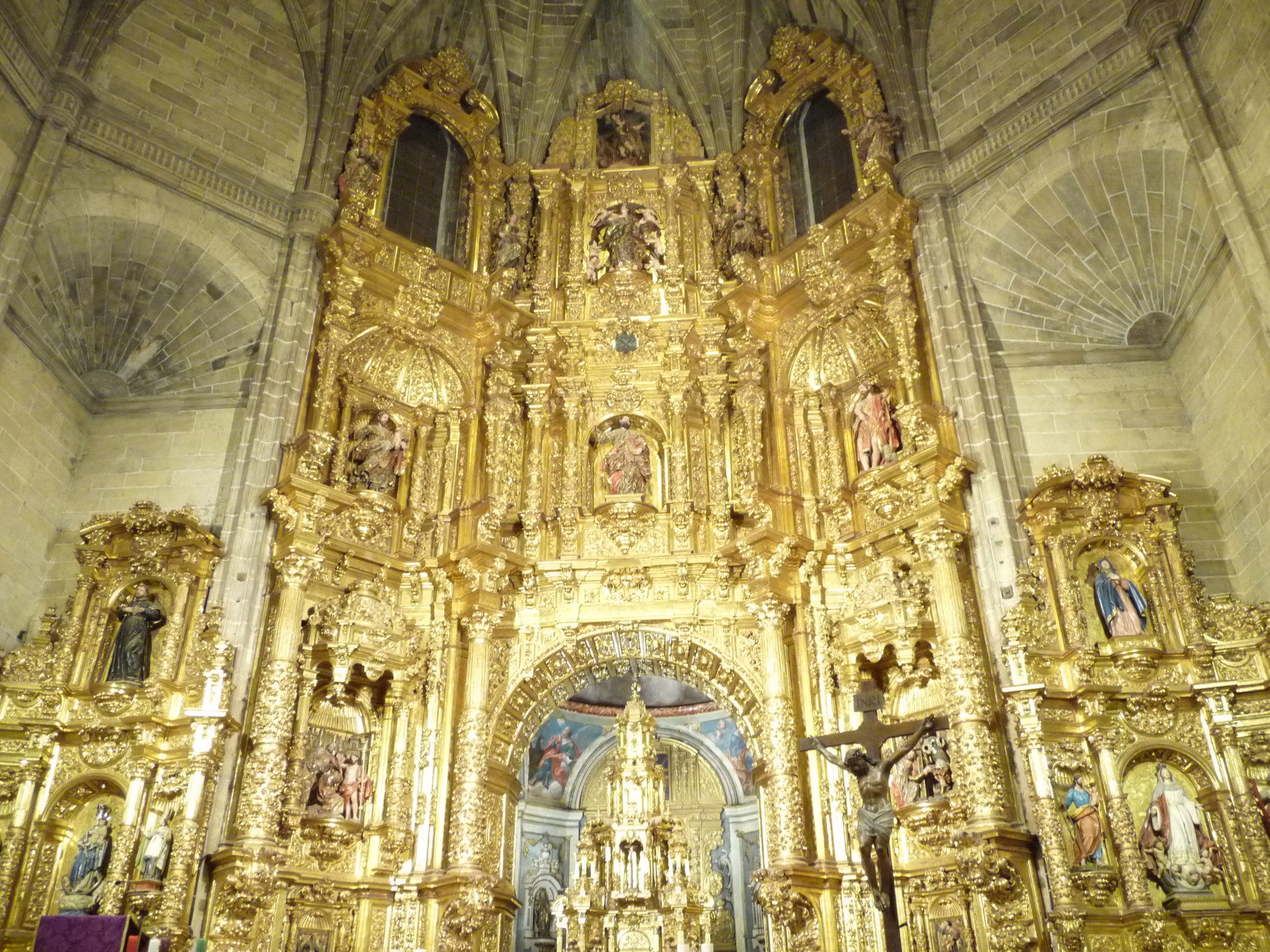 Iglesia de Santo Tomás. Haro, La Rioja (España) - Altar mayor y laterales